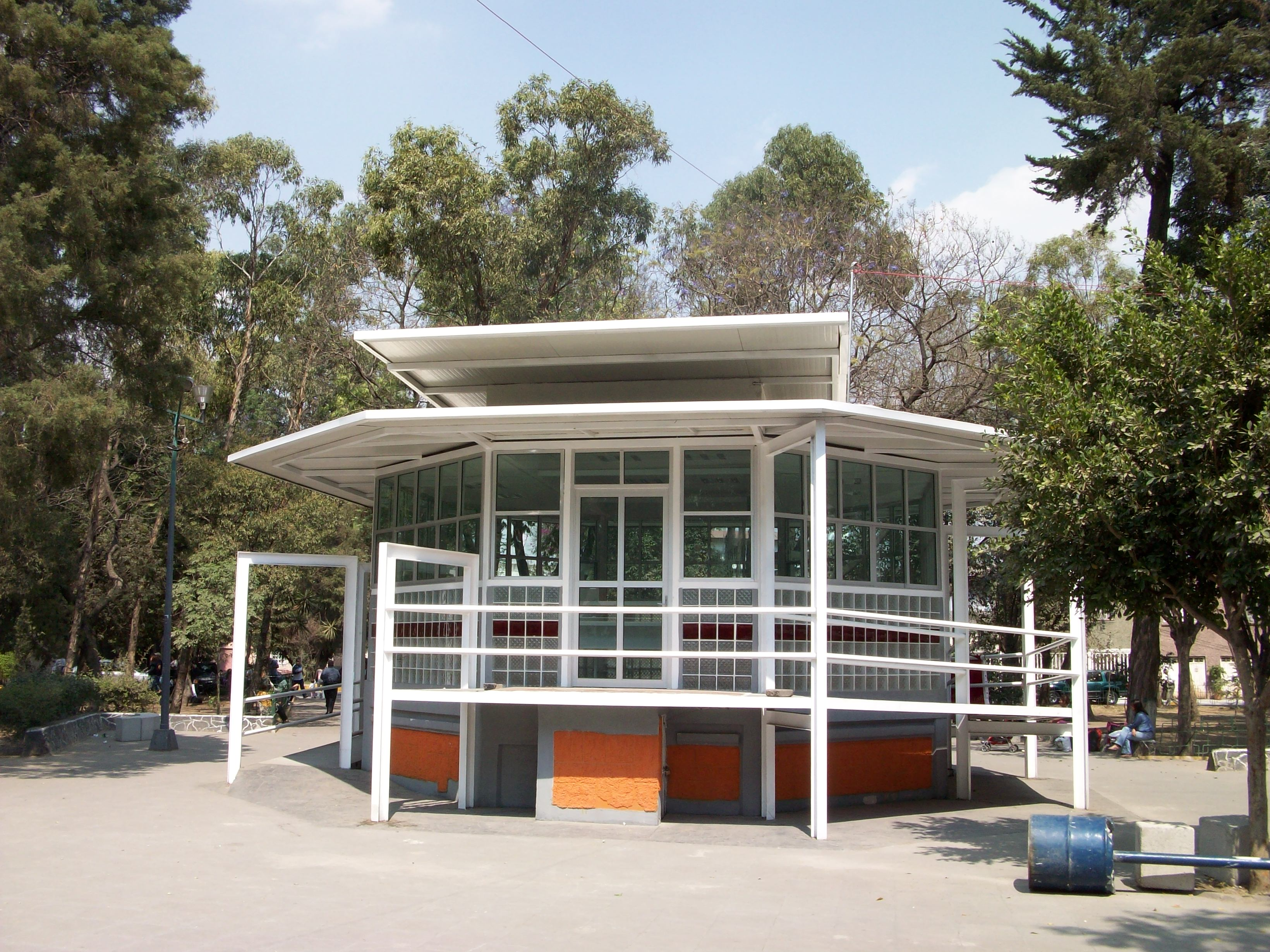 Kiosco